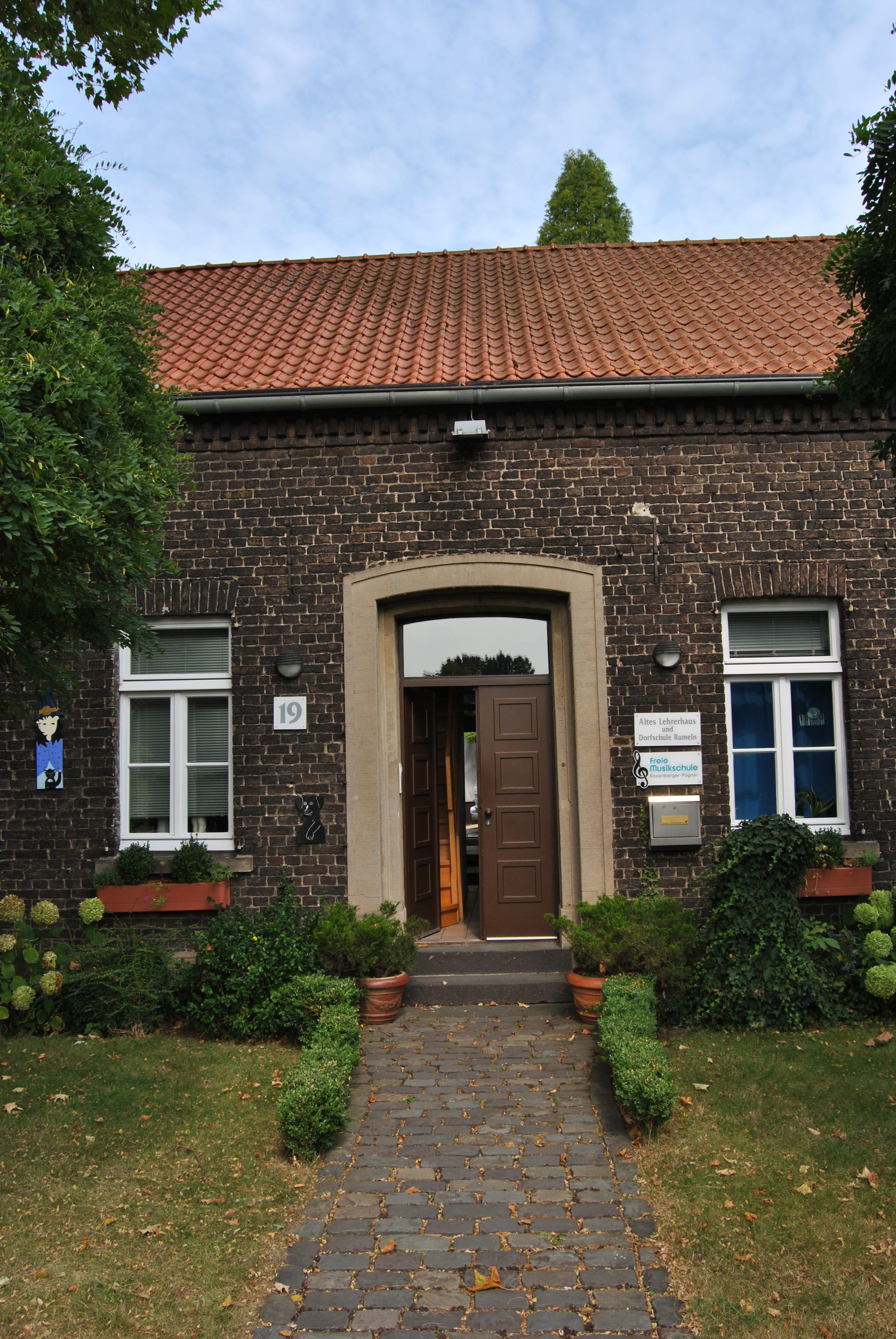 This photograph was taken with a Nikon D3000 This image shows a heritage building in Germany, located in the North Rhine-Westphalian city Duisburg. Eingang des alten Lehrerwohnhauses der ehemaligen Dorfschule Rumeln, heute als Musikschule genutzt - Denkmalliste Duisburg, Nr. 365 - Objektkoordinaten: 51.24'10.28"N, 6.39'45.16"E